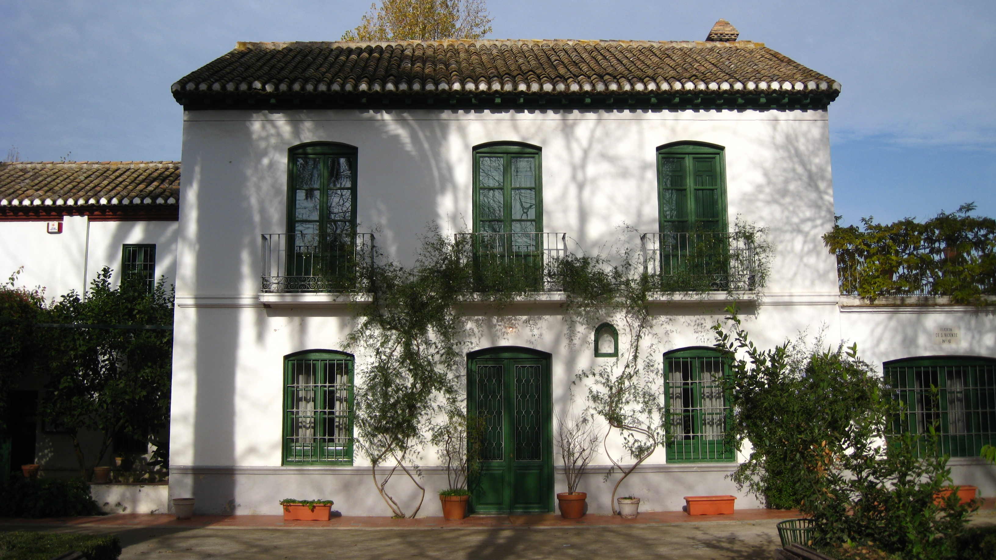 La Huerta de San Vicente, anteriormente llamada Huerta de los Mudos, fue un regalo que Federico García Rodríguez hizo a su esposa Vicenta Lorca en 1925. Por este motivo le cambiaron la denominación por la de Huerta San Vicente (El nombre aparece en una placa colocada en la fachada). Fue la residencia de verano de la familia García Lorca desde 1926 hasta 1936.